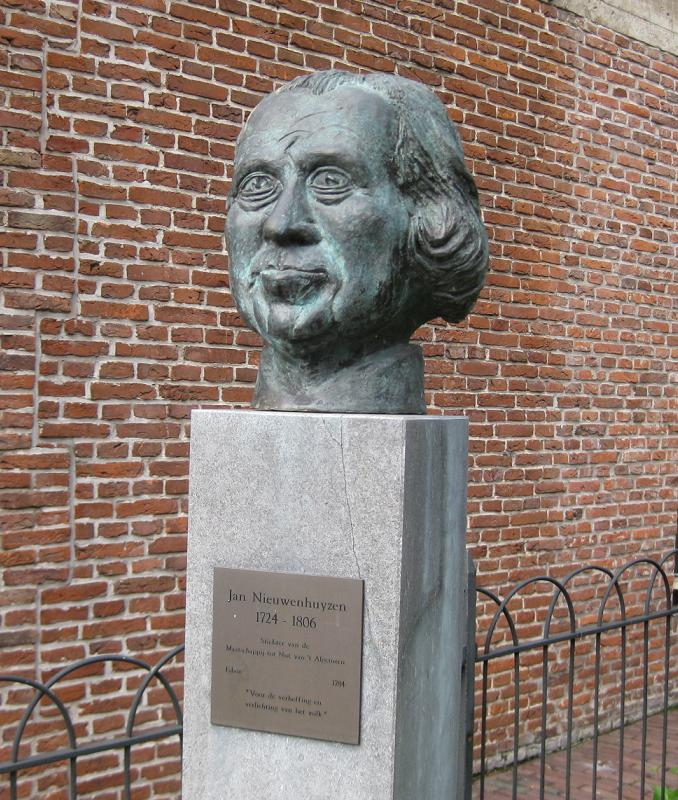 Standbeeld van Jan Nieuwenhuyzen op het Jan Nieuwenhuyzenplein in Edam. Kunstenaar Hans Luchies.